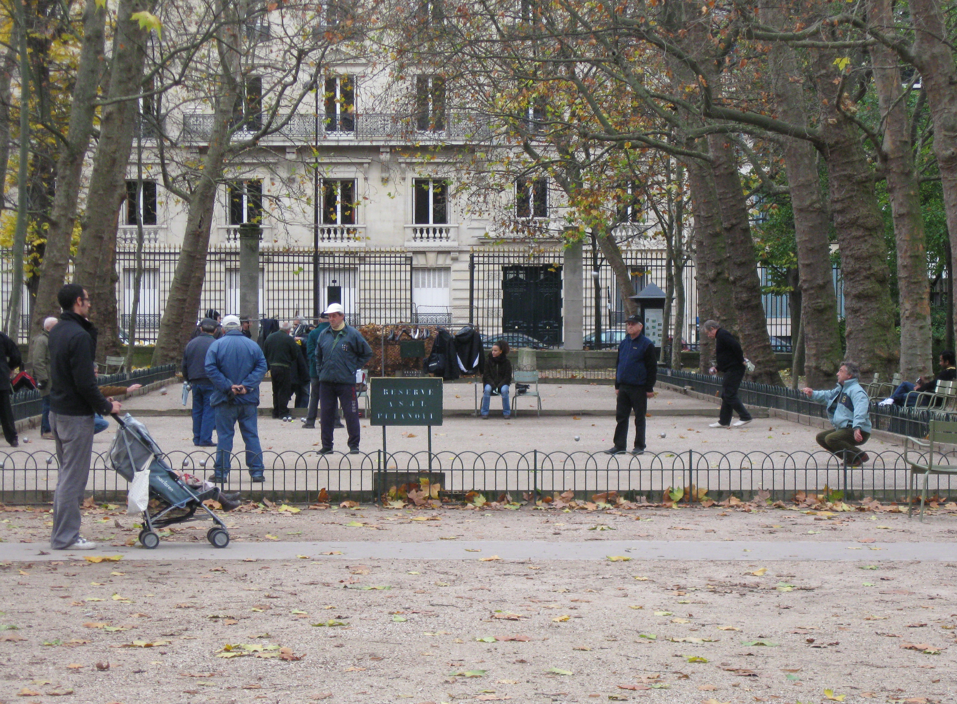 Boulodrome réservé à l'Association sportive du jardin du Luxembourg (ASJL), Paris VIe arrondissement, France.